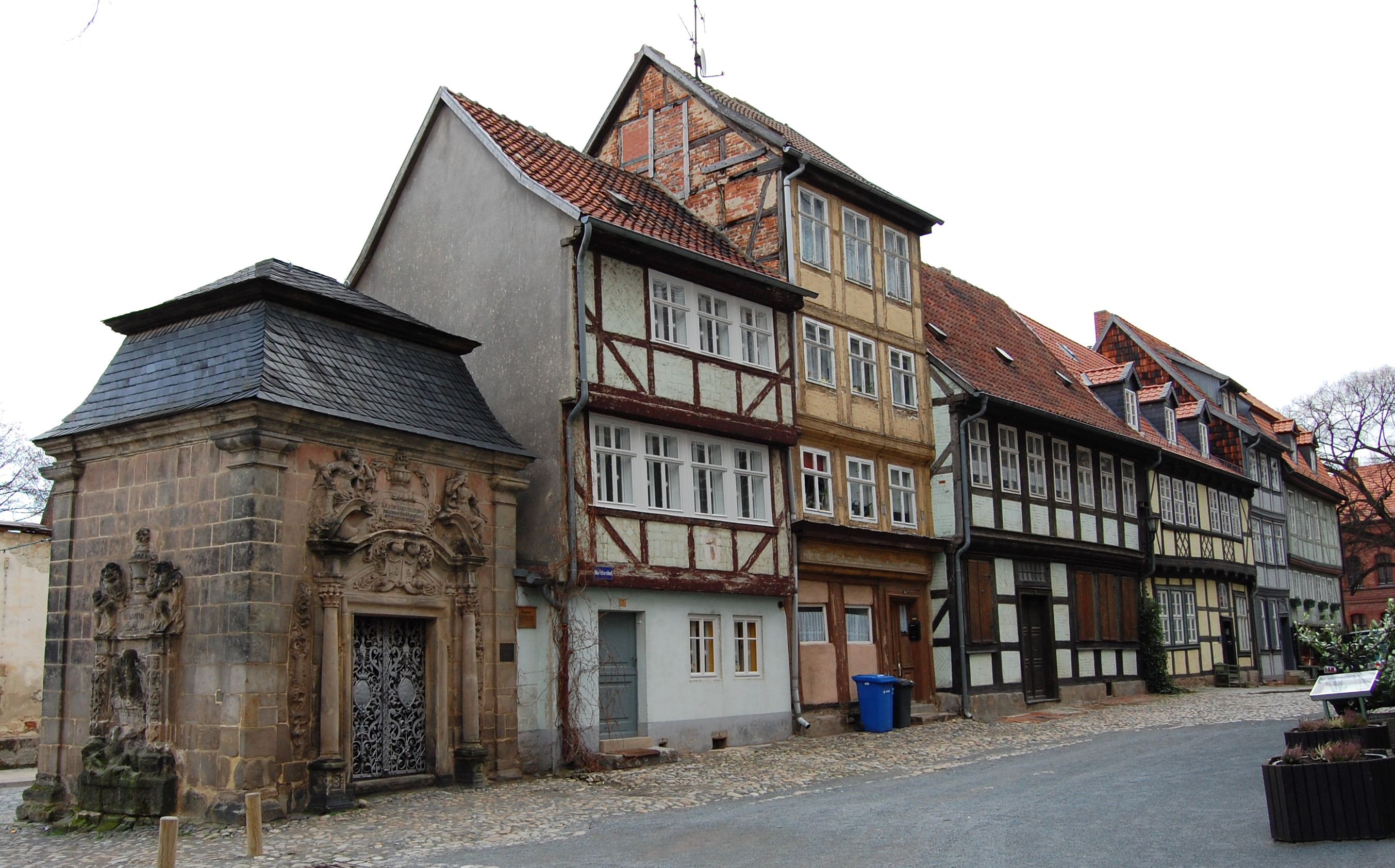 Goetzsches Mausoleum und angrenzende Bebauung des Marktkirchhofes in Quedlinburg